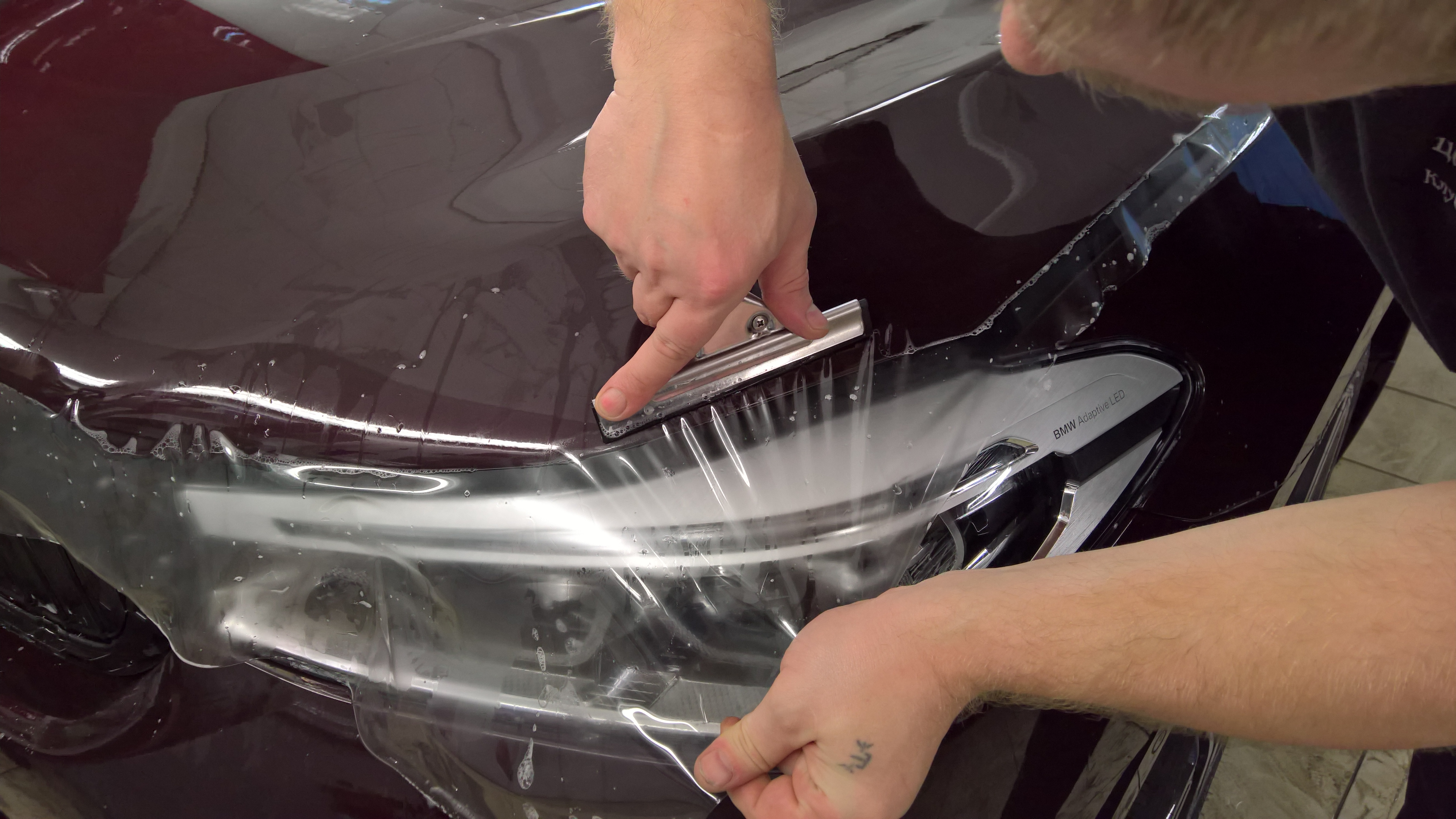 Инсталляция антигравийной пленки на капот автомобиля BMW GT6